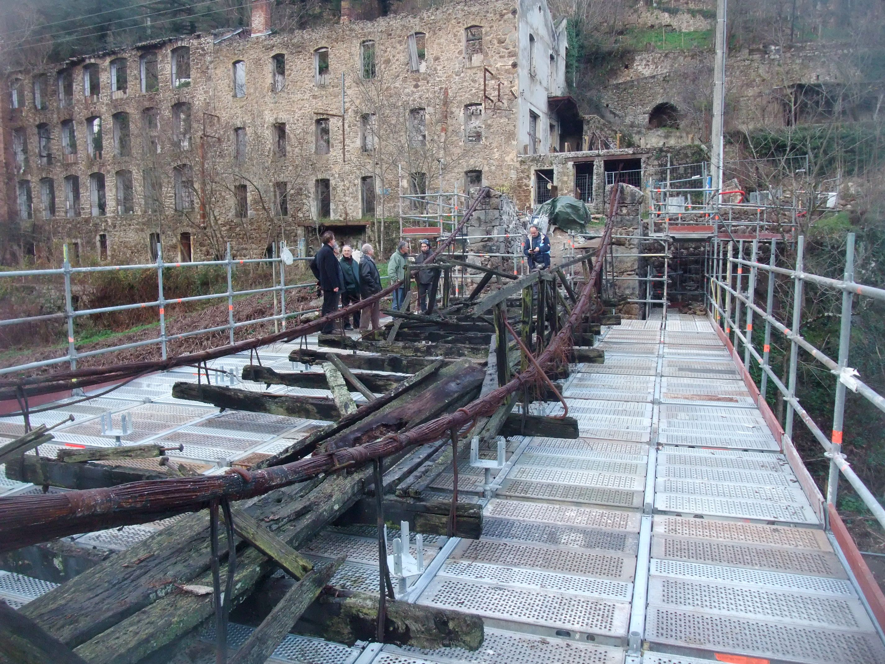 Pont de Moulin sur Cance échafaudage et tablier